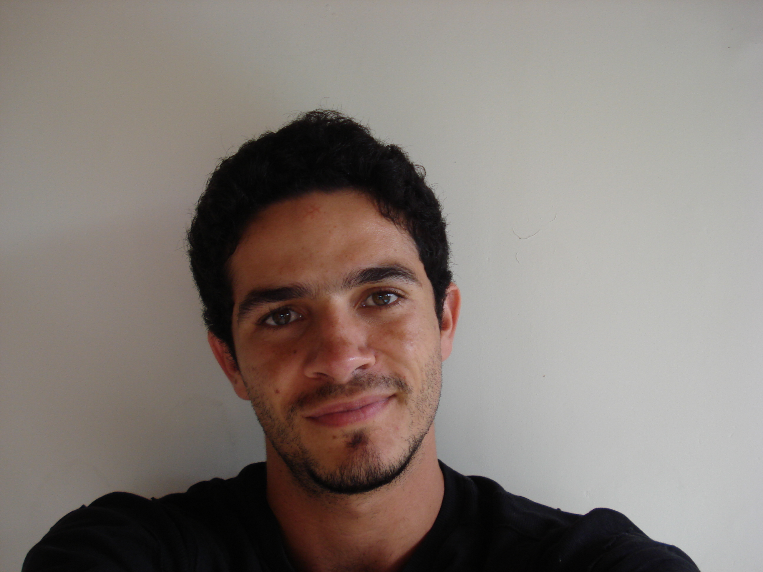 Foto do ator Vinicius de Oliveira